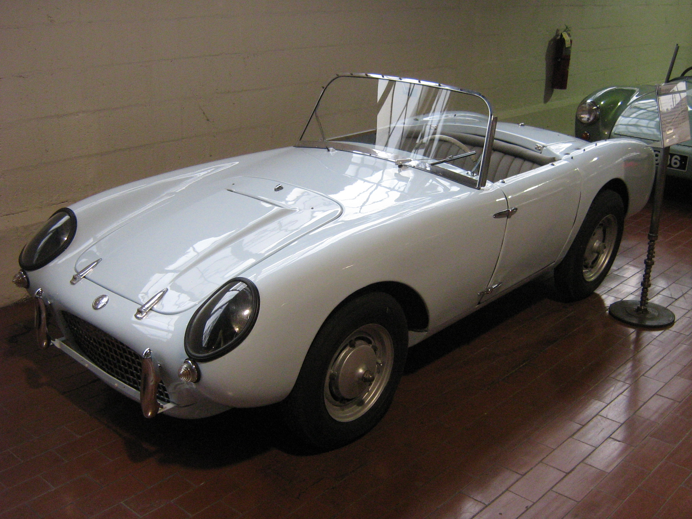 1959 Berkeley Sports SE328